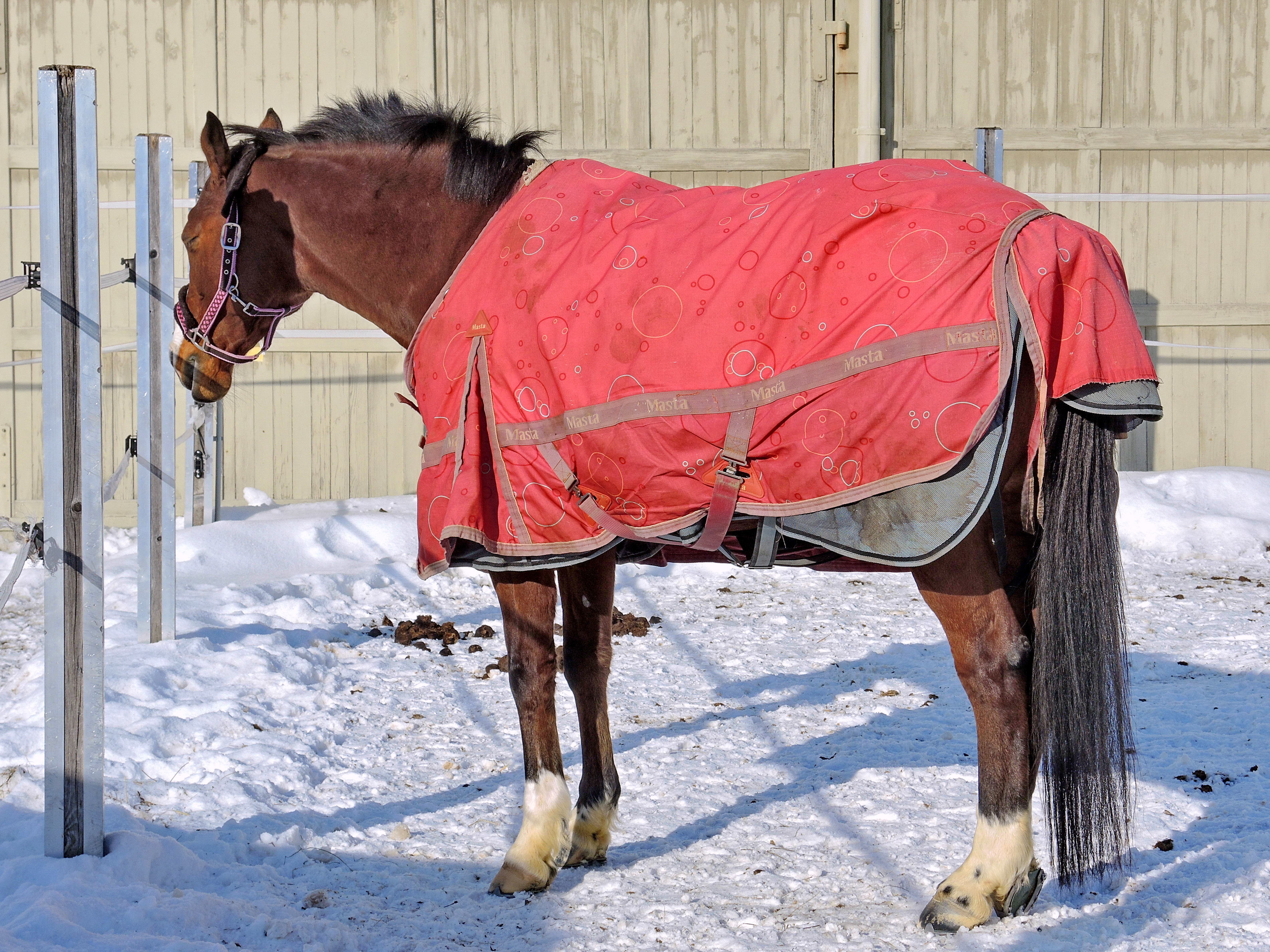 Cavalli della Madonna, Marstall, Kloster Einsiedeln in Einsiedeln (Switzerland)